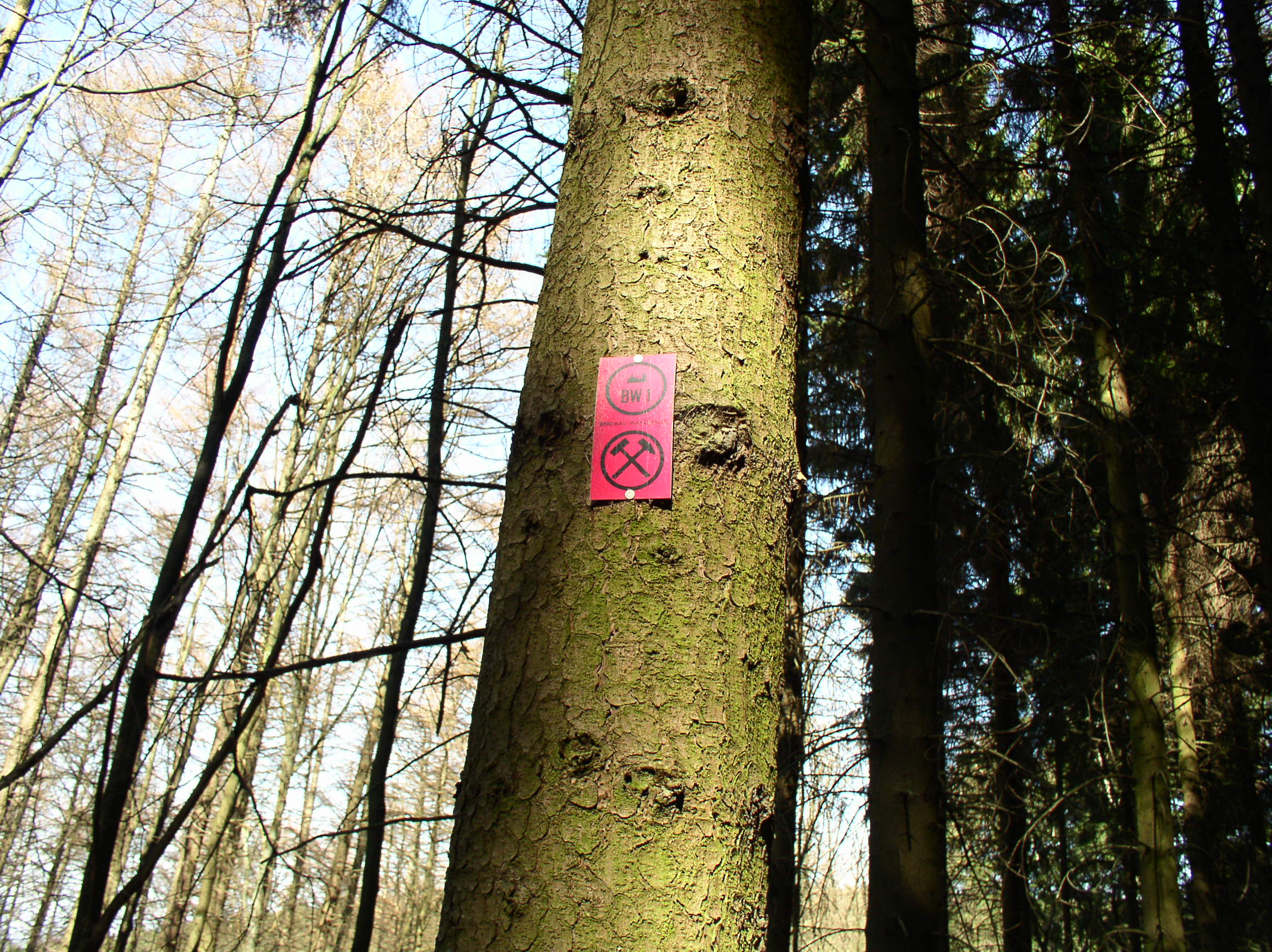 Wegzeichen des Bergbauwanderwegs Schlebuscher Wegs in Wetter (Ruhr)